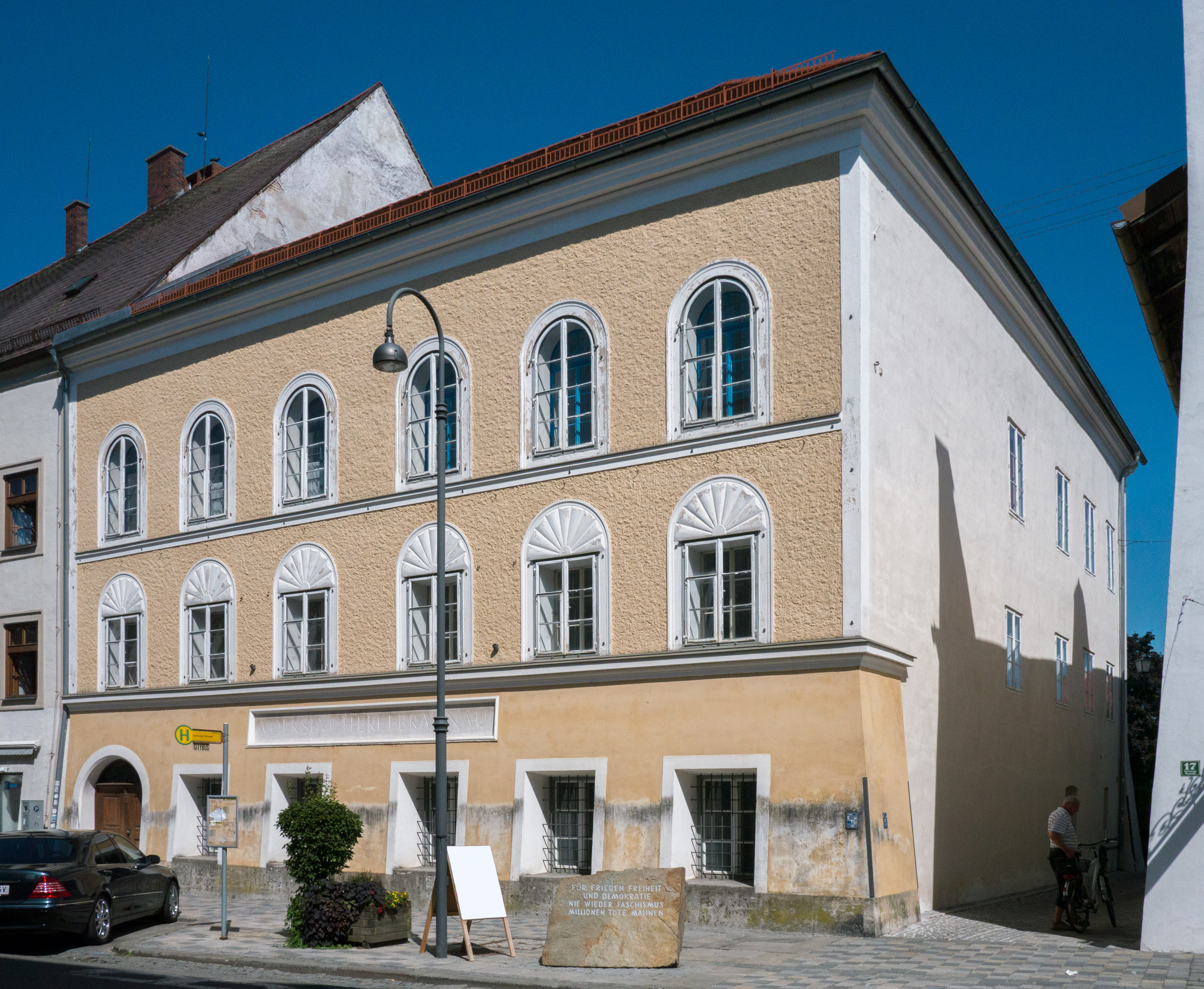 Bürgerhaus